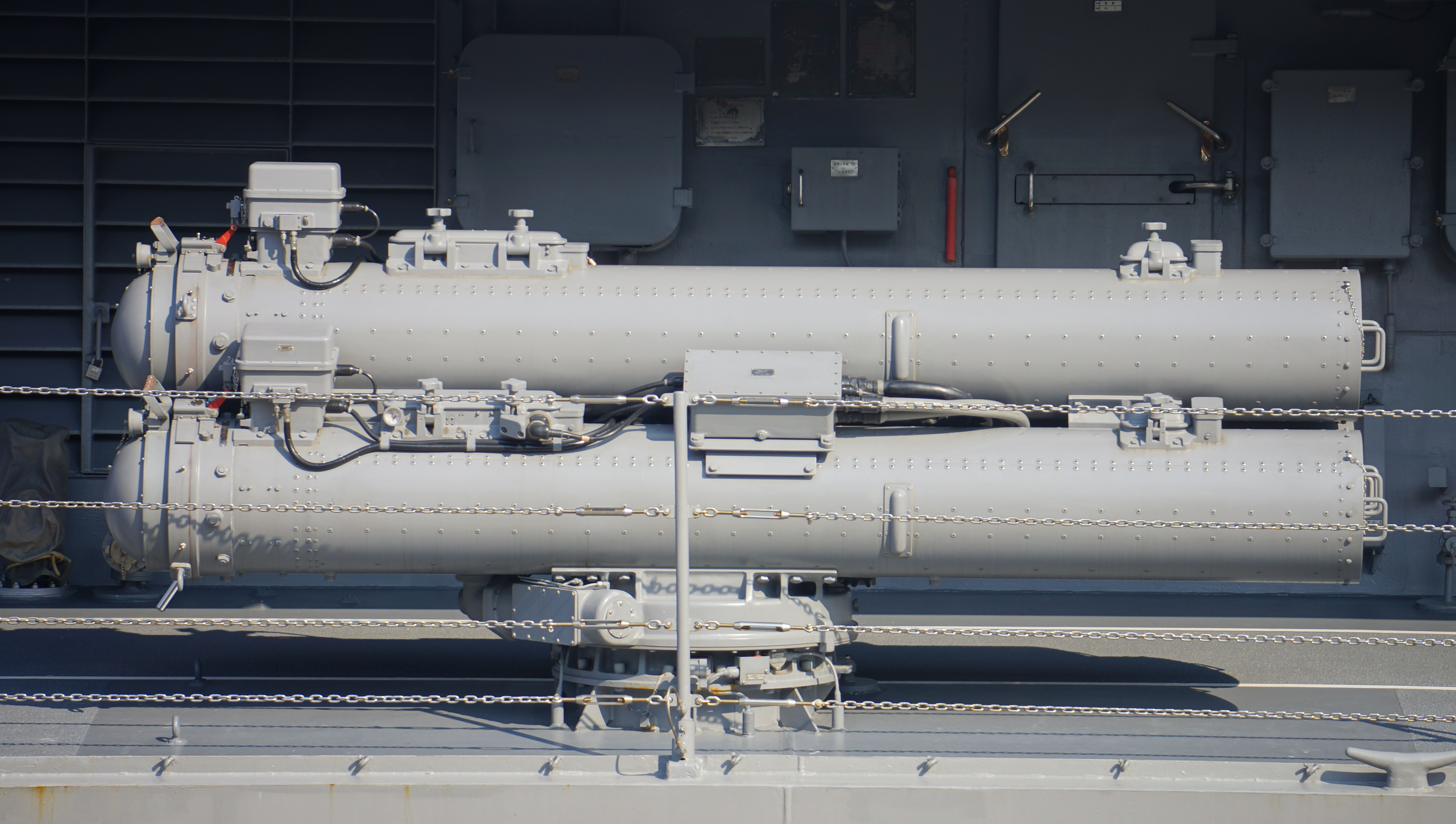 海上自衛隊 護衛艦あたご（DDG-177） HOS-302 3連装短魚雷発射管。 14年4月26日 天保山埠頭にて。